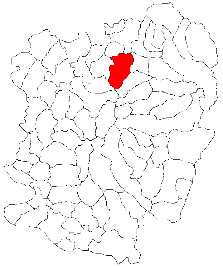 Categorie:Hărţi ale judeţului Caraş-Severin